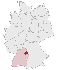 Landkreis Schwäbisch Hall, Baden-Württemberg, Germany